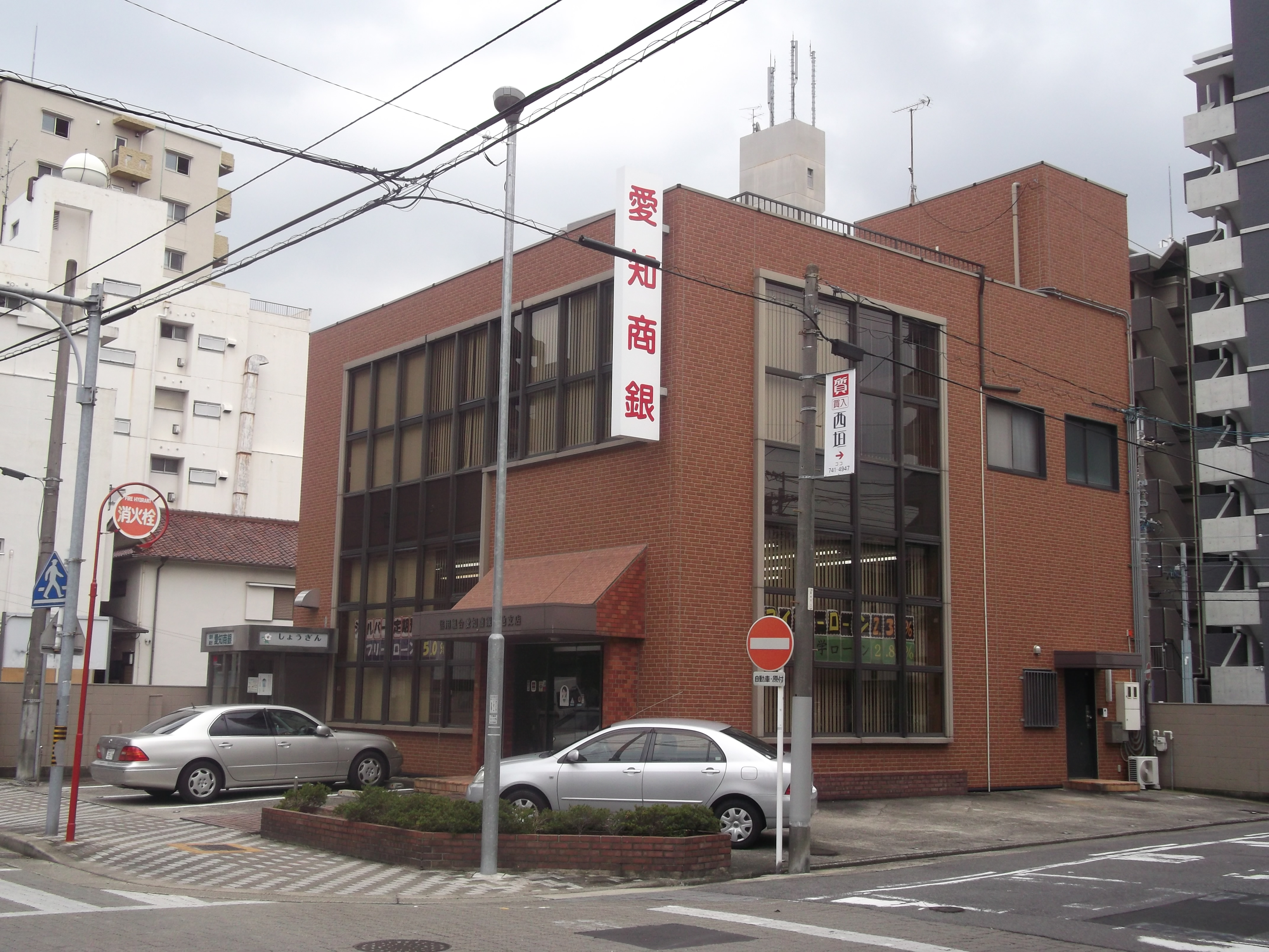 名古屋市千種区の愛知商銀今池支店を西側公道北側より撮影